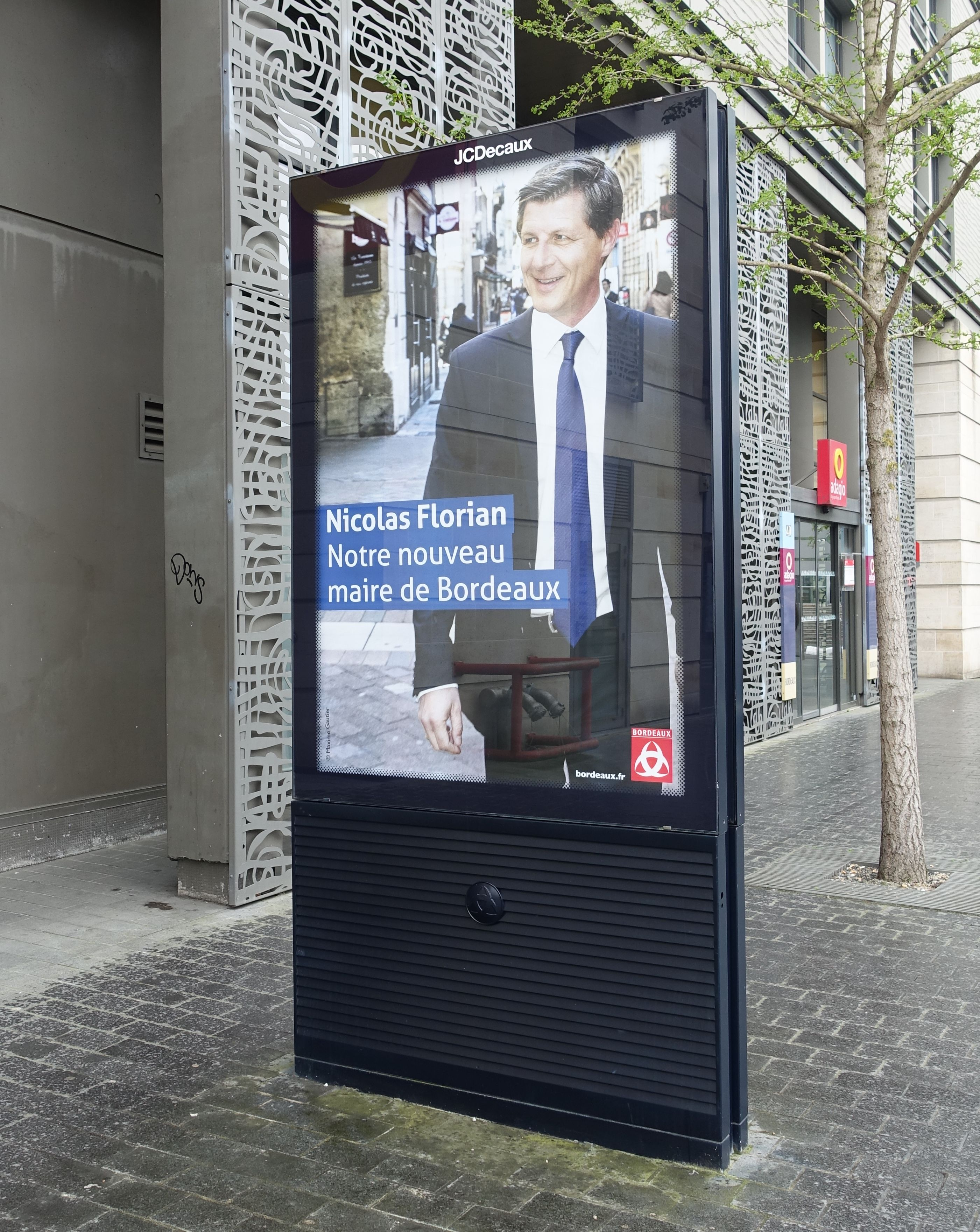 « sucette » de 2 m2 de la ville de Bordeaux, square des Commandos de France.